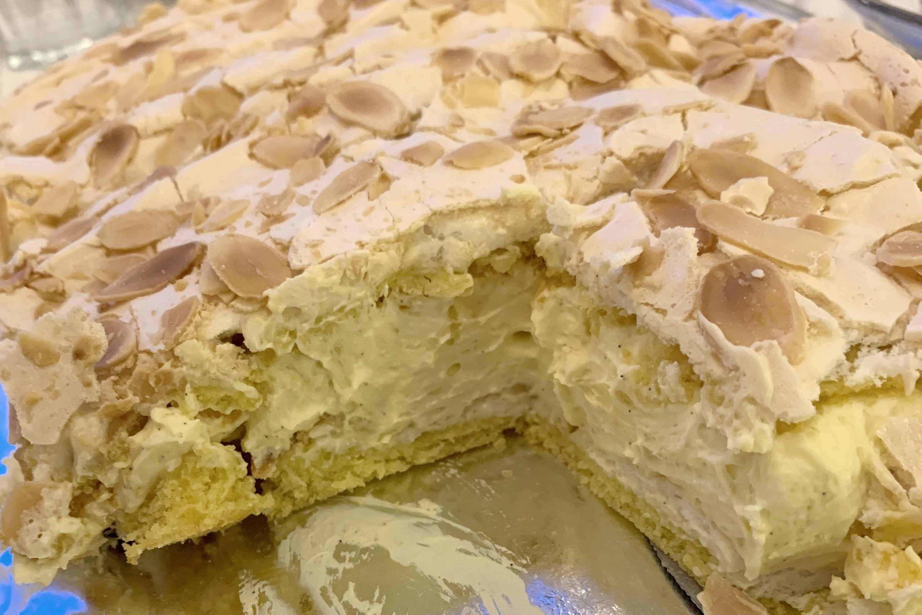 Kvæfjordkake, også kjent som «Verdens beste».